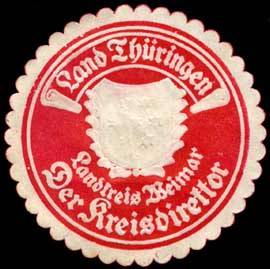 Sealing stamp Title: Land Thüringen - Der Kreisdirektor Landkreis Weimar Description: rot, weiß, geprägt Place: Weimar size: 5 cm